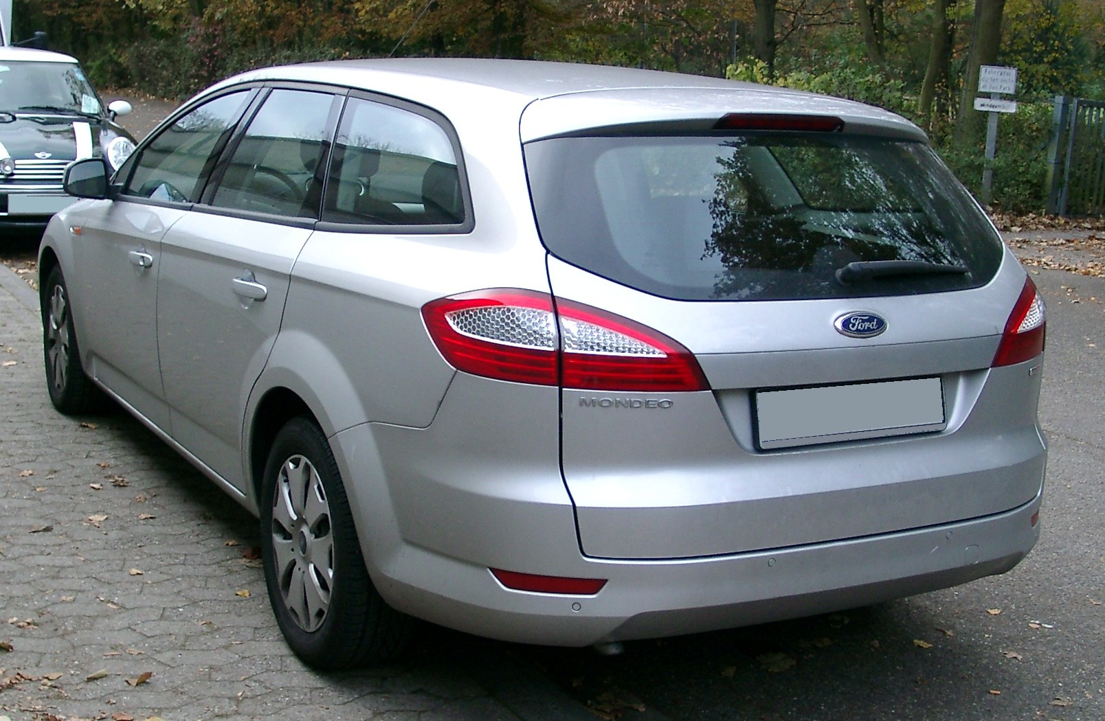 Ford Mondeo, 3. Generation